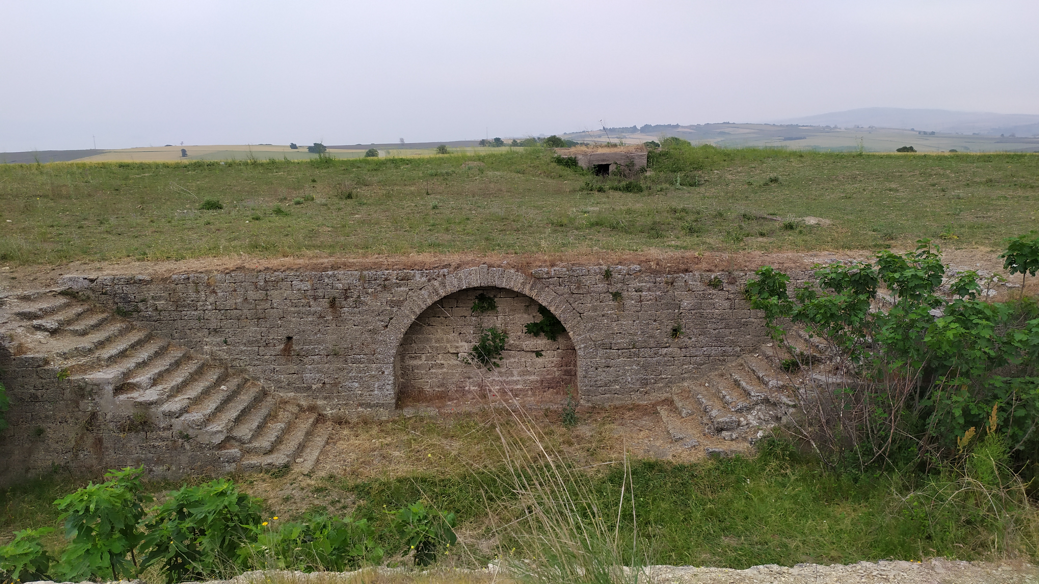 Çimpe Kalesi'nin günümüzdeki kalıntıları